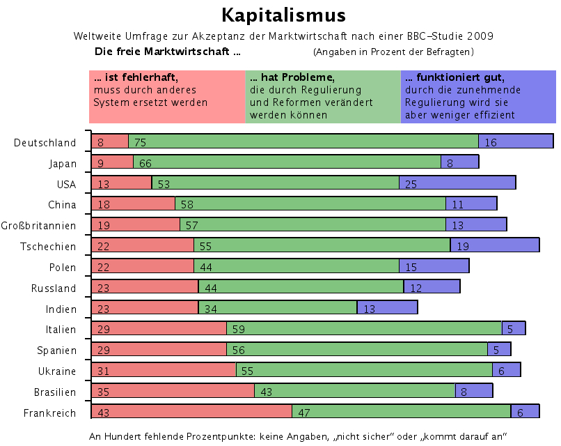 Grafik